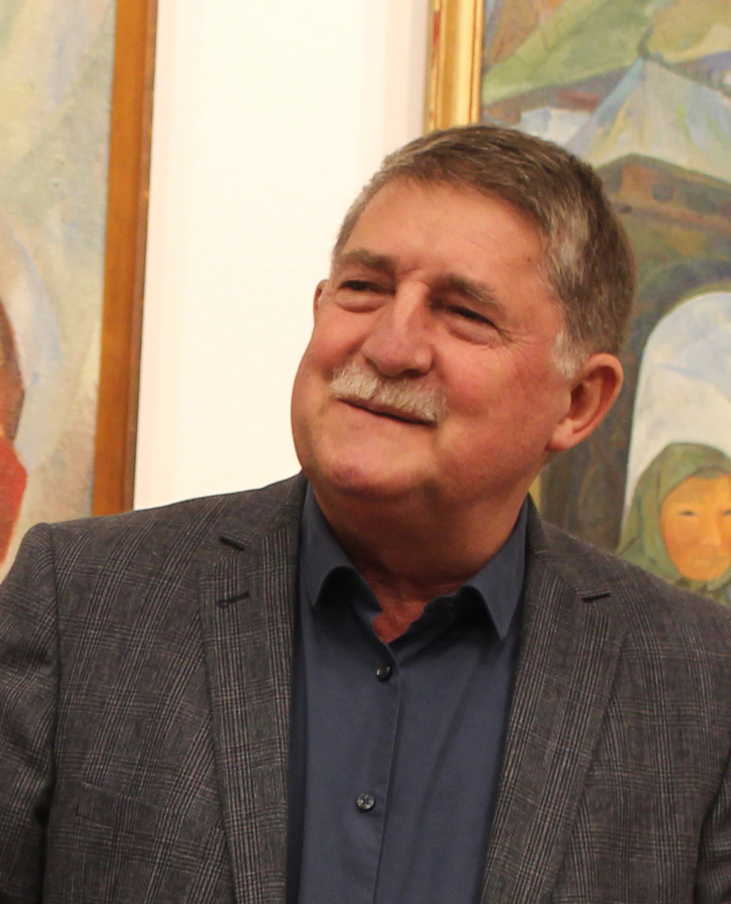 Pozsony Ferenc